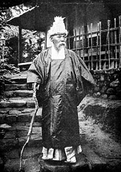 中文（香港）: 平田源吾